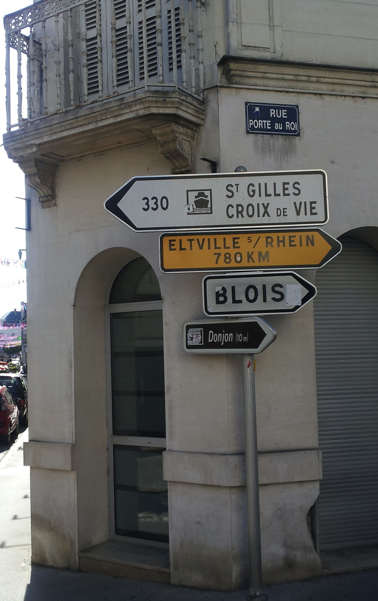 Panneau à Montrichard indiquant les directions et distances vers les villes jumelées